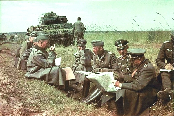 Генерал Гудериан со своим штабом на московском направлении